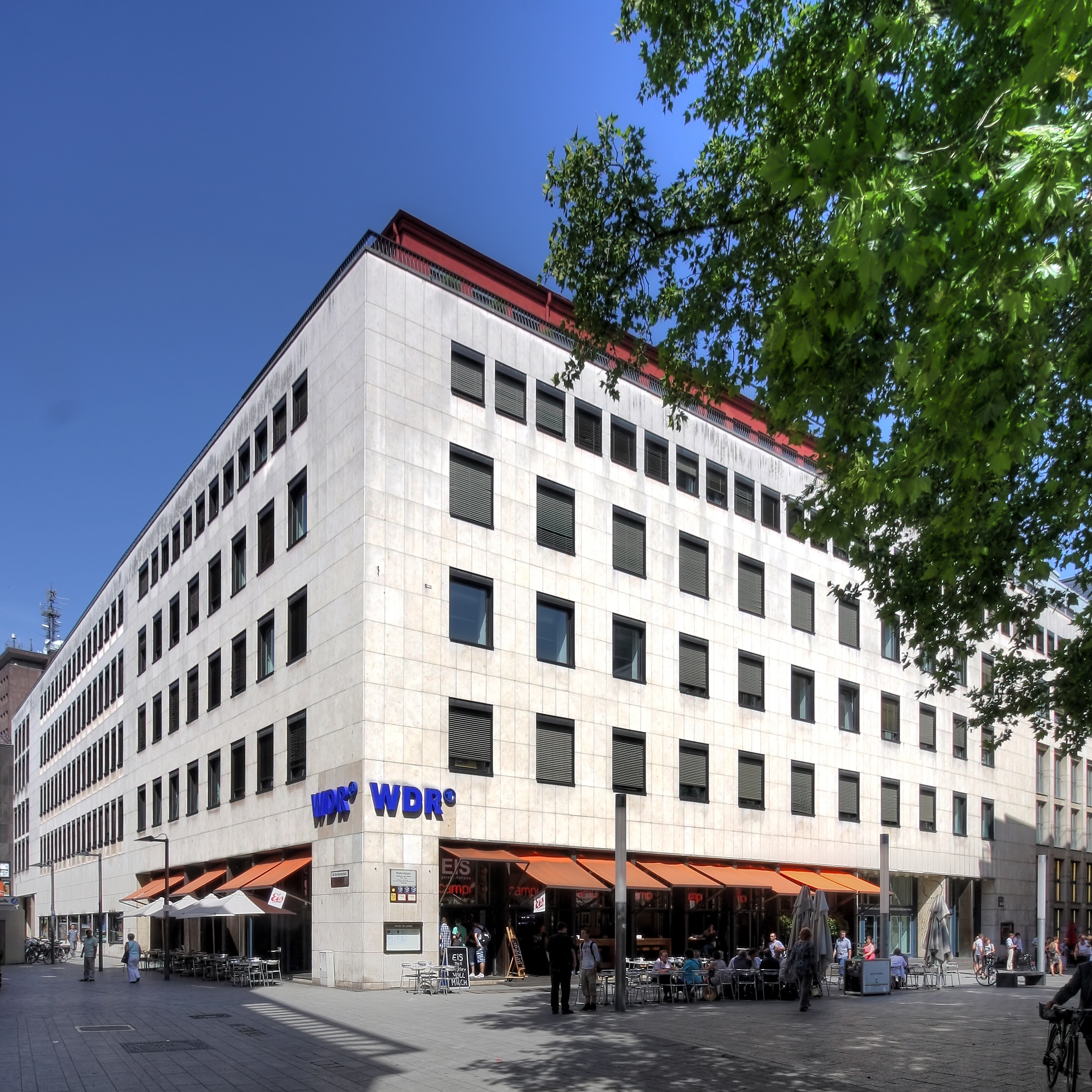 WDR Funkhaus am Wallrafplatz, Köln. Architekt: Peter Friedrich Schneider, Baujahr: 1949-52, Bauherr: Nordwestdeutscher Rundfunk This is a photograph of an architectural monument.